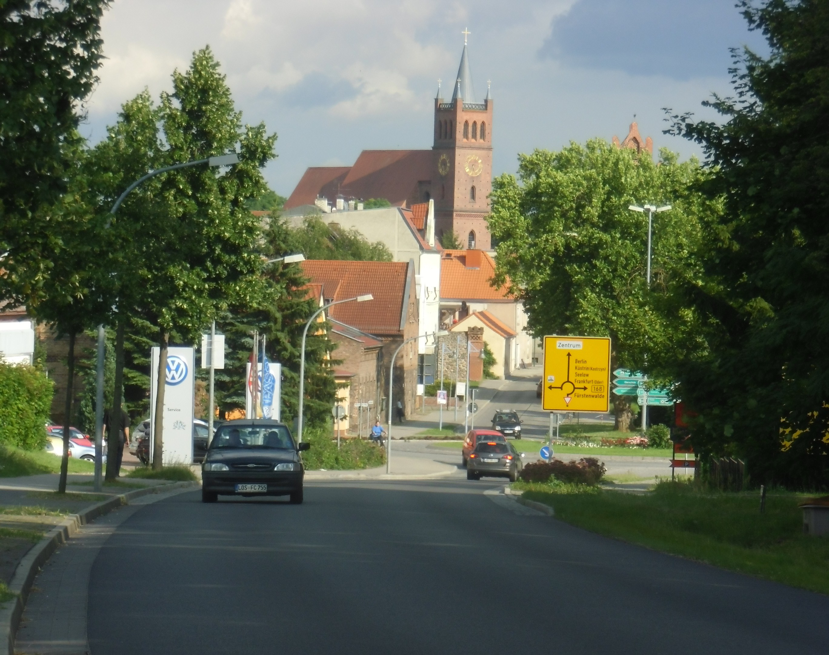 Blick von der Eberswalder Srtraße auf das Stadtzentrum von Müncheberg mit der Kirche St. Marien